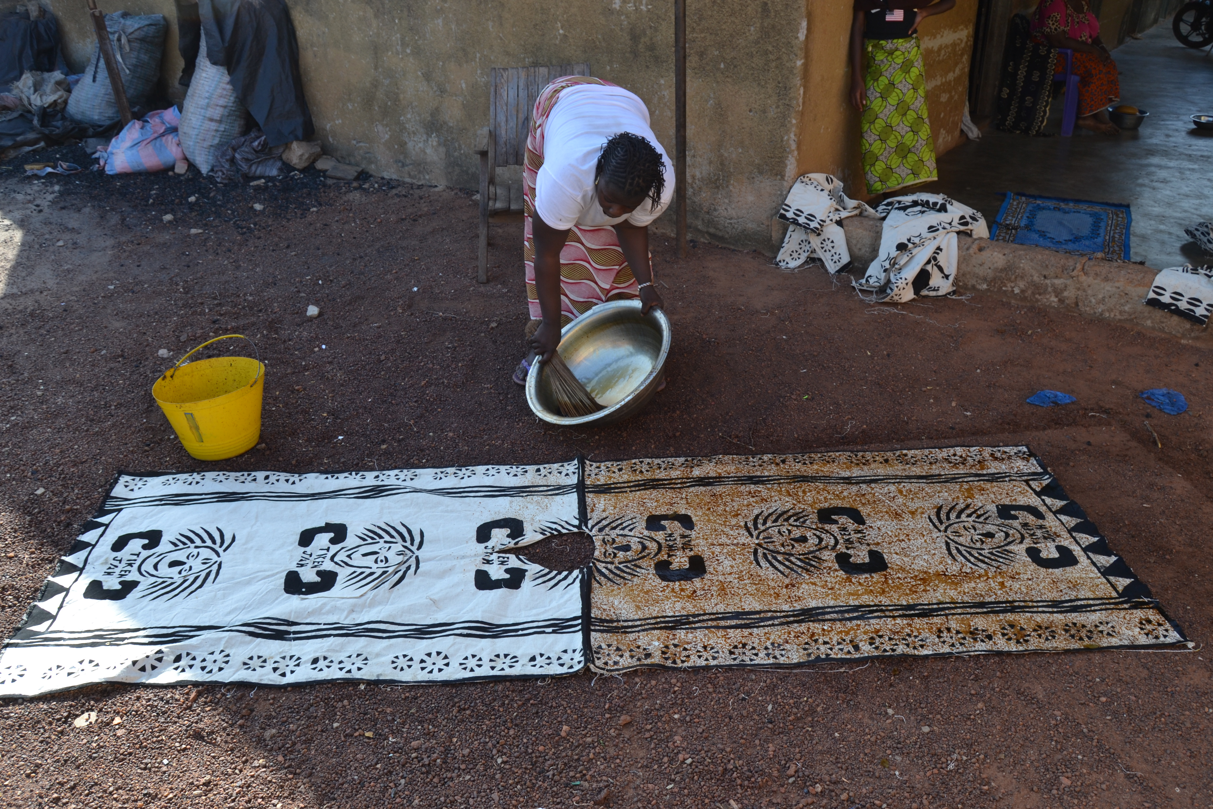 Une teinturière en activité à Ferkessédougou (Ferké), une localité située au nord de la Côte d'Ivoire, à environ 600 km d'Abidjan, la capitale économique ivoirienne. Le produit utilisé pour la teinture est obtenu à partir d’écorces, de feuilles et de racines d’arbres.